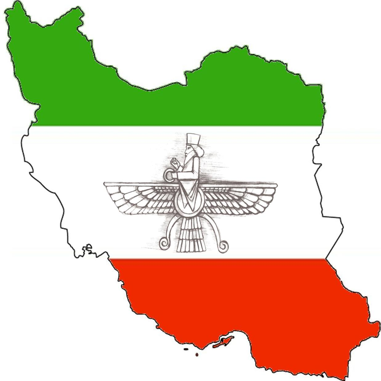 اهورا مزدا در ایران